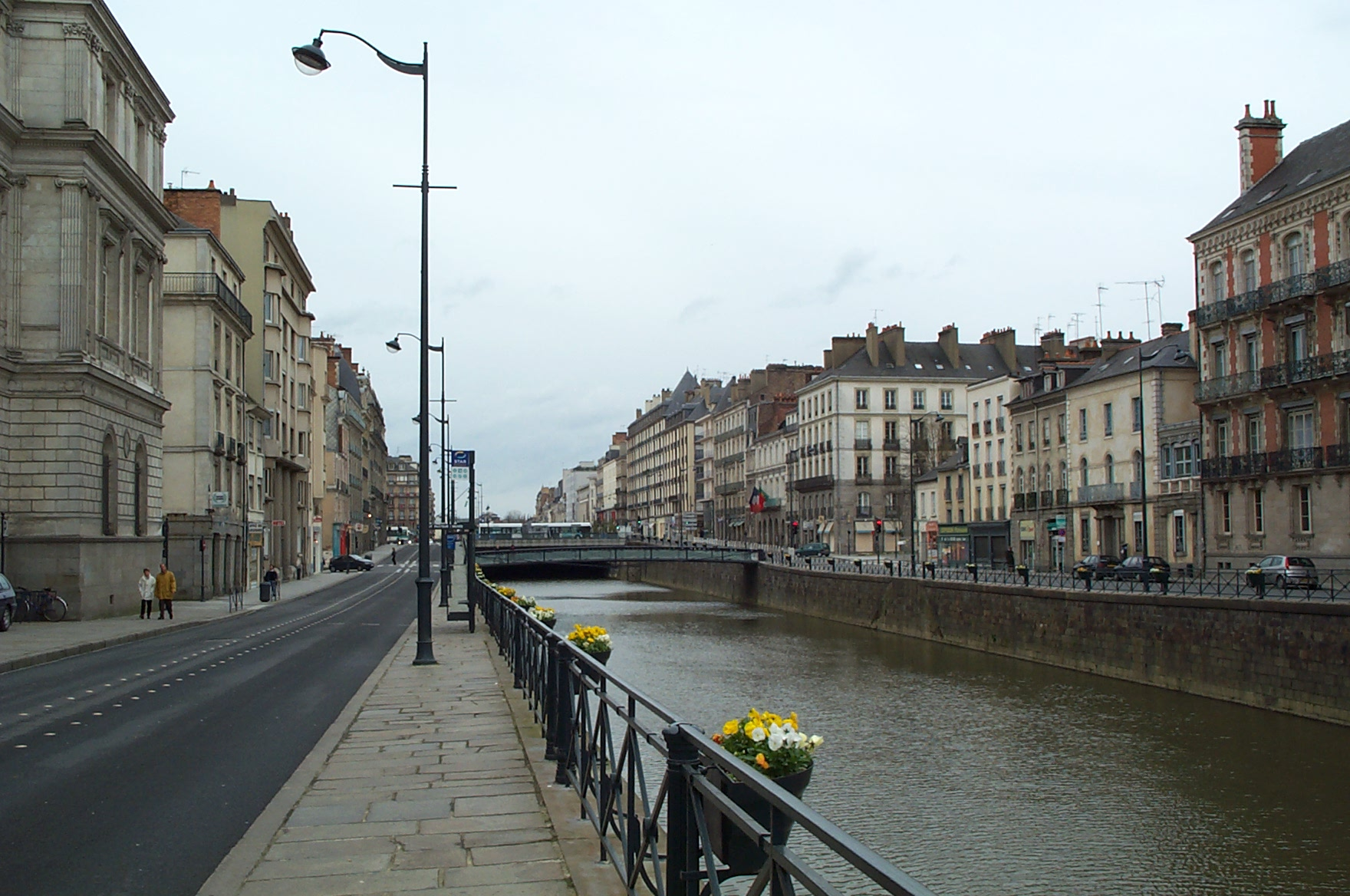 La Vilaine canalisée au niveau du quai Zola à Rennes.